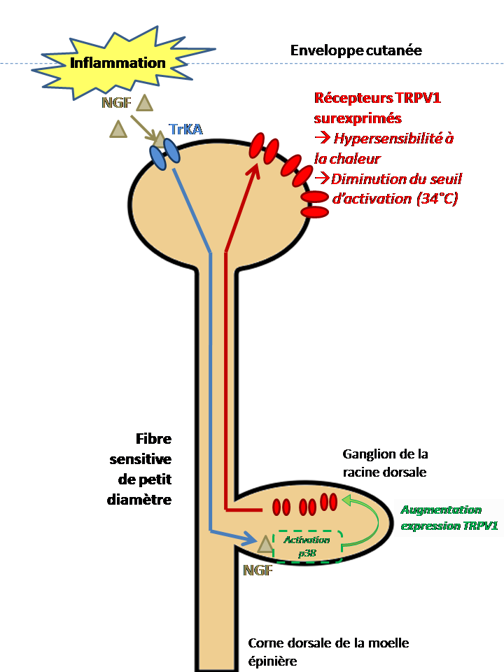 Le rôle des récepteurs TRPV1 dans l'inflammation